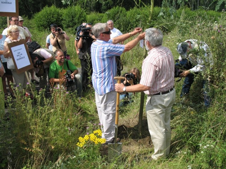 Vereniging STOP awacs